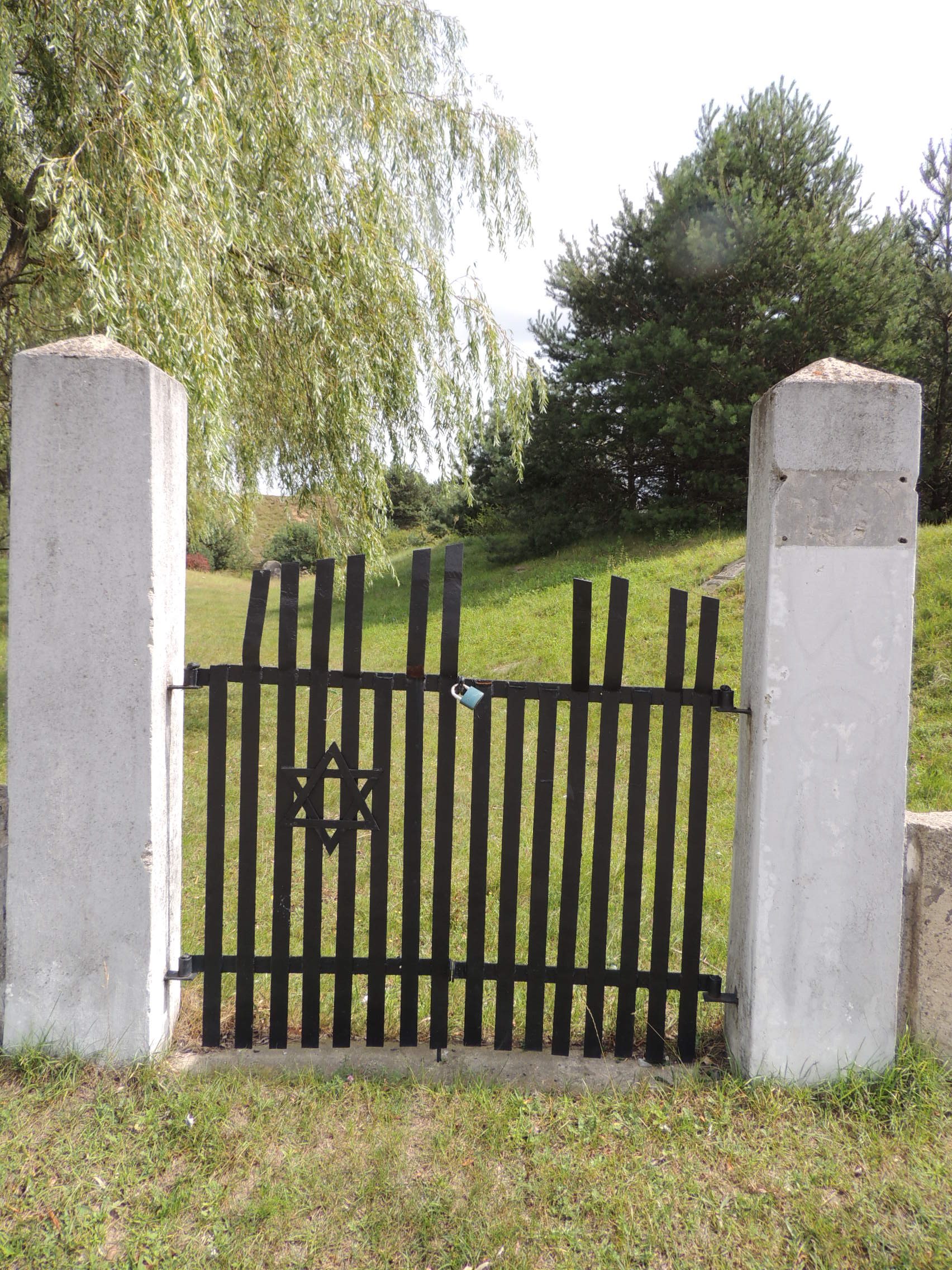 Jewish cemetery in Brzeziny